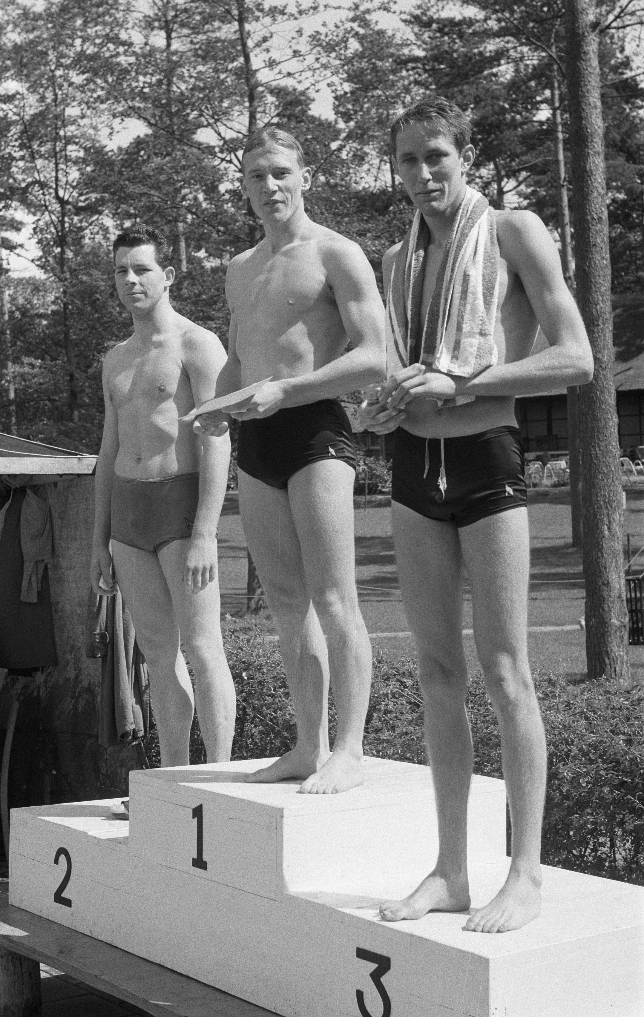 Nederlandse zwemkampioenschappen te Apeldoorn, nr. 12 en v.l.n.r. J. de Jong, Jan Jiskoot, kampioen 100 meter rugslag en J. Weeteling. Location: Apeldoorn, Gelderland